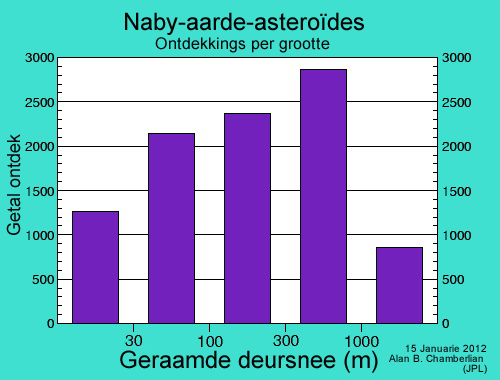 Grootte van naby-aarde-asteroïdes